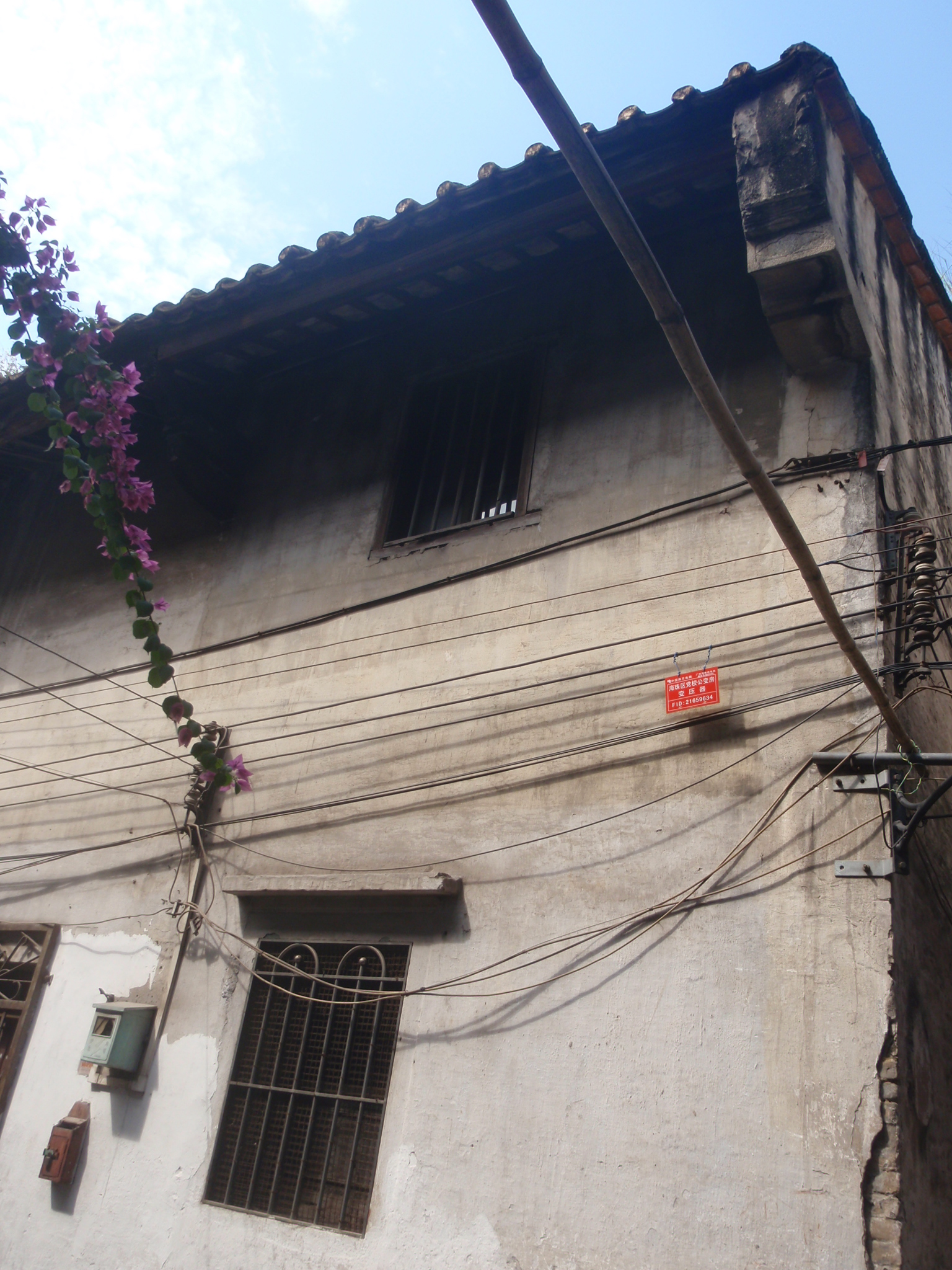 粵語: 廣州 潘能敬堂